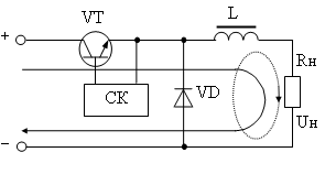 Понижающий преобразователь напряжения